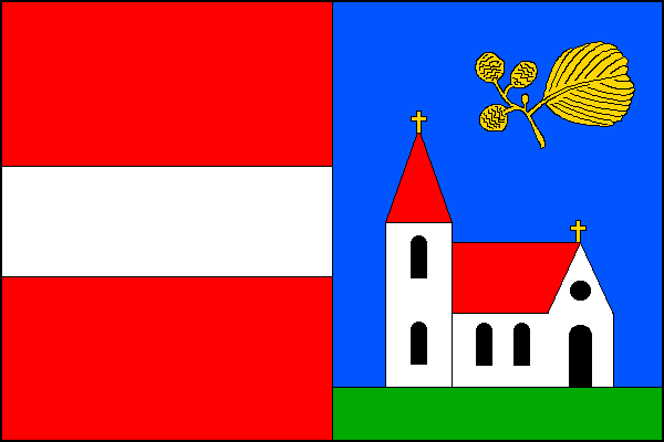 vlajka, Olešnice v Orlických horách, okres Rychnov nad Kněžnou